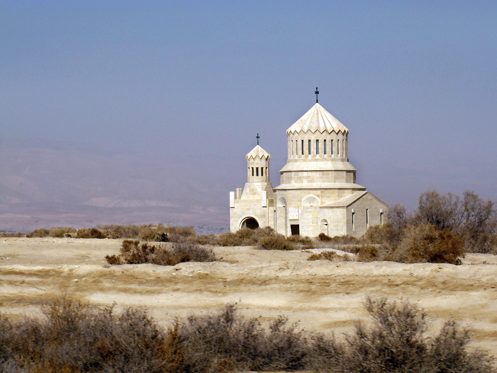 Սբ. Կարապետ եկեղեցին Հորդանանում՝ Քրիստոսի մկրտության վայրում